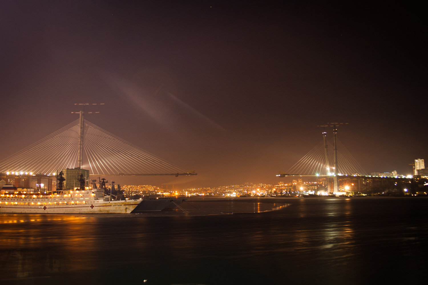 Строительство моста через бухту Золотой Рог 08.01.2012